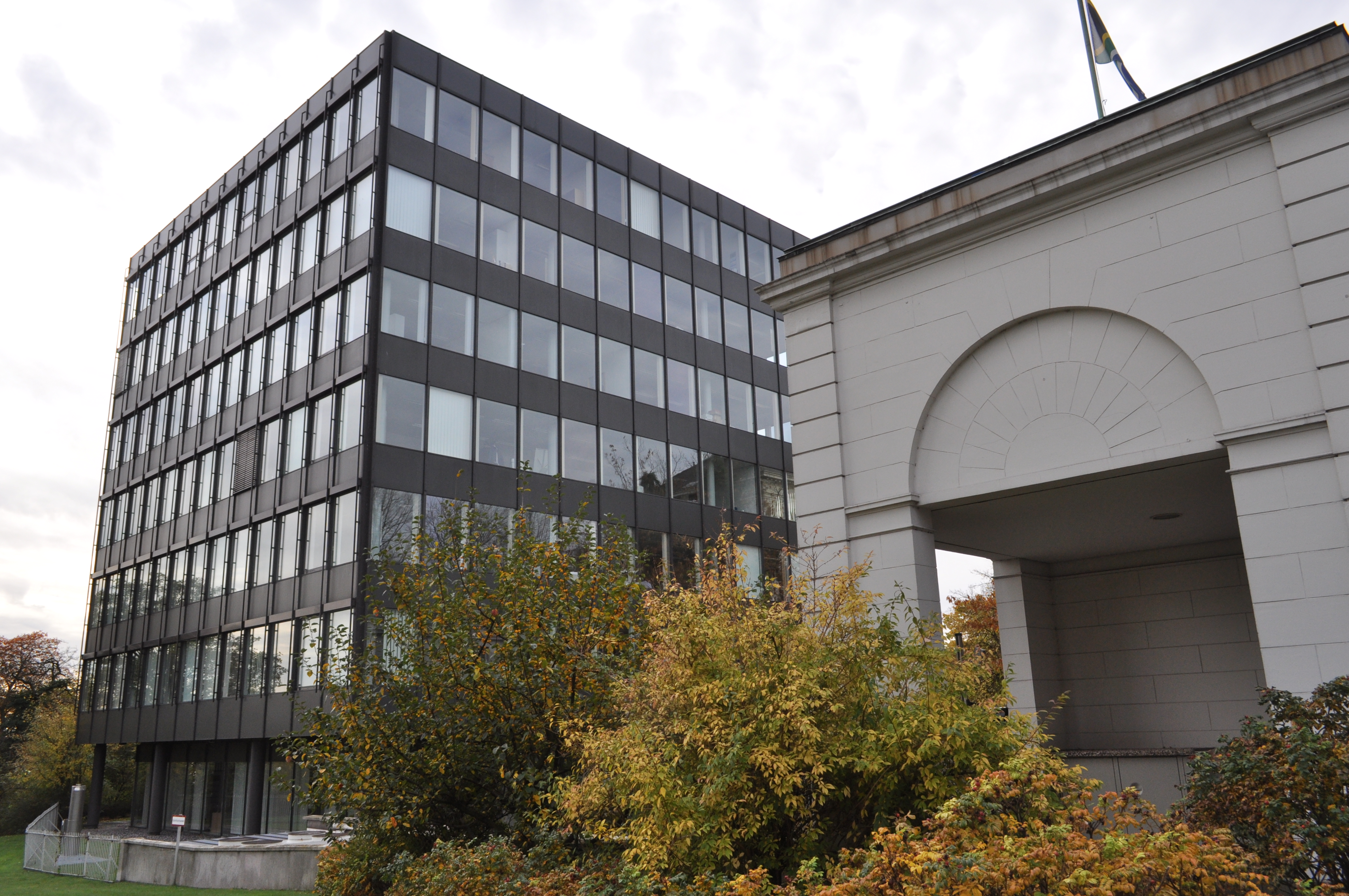 Südseite der Palmaille 45–59 in Altona-Altstadt This is a photograph of an architectural monument. , 14197, 14319 1967 wurde von Henrich & Petschnigg ein Bürohaus Palmaille 45 daneben gesetzt. (Hermann Hipp, Freie und Hansestadt Hamburg S. 295), Sitz des Honorarkonsulats von Südafrika. Palmaille 45, 49, 51, Bausches Palais für Georg Friedrich Baur und dessen Kinder, Stadtpalais.Denkmalliste-Altona 2015 S. 722 (PDF; 1,9 MB)Das Palais Nr. 49 beherbergt seit Jahrzehnten die Zentrale der Deutsche Afrika-Linien/John T. Essberger Group of Companies